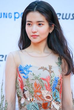 김태리가 지난 15일 오후 서울 송파구 잠실실내체육관에서 열린 '2017 아시아 아티스트 어워즈(2017 Asia Artist Awardsㆍ이하 2017 AAA)' 레드카펫 행사에서 참석하고 있다.